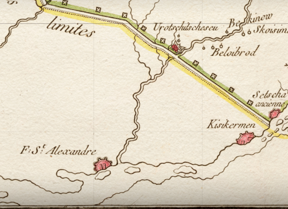 Майбутній Херсон — Олександрівський шанець (F.St. Alexandre — Форт Св. Олександра), Кизикермен (Берислав), Січ. Джерело: мультимедійний інформаційно-освітній проект Vkraina. Карта "Нової Сербії" з військового атласу Лє Ружа, Париж, 1769 р. (Nouvelle Servie. Chez le Rouge (Paris, 1769).